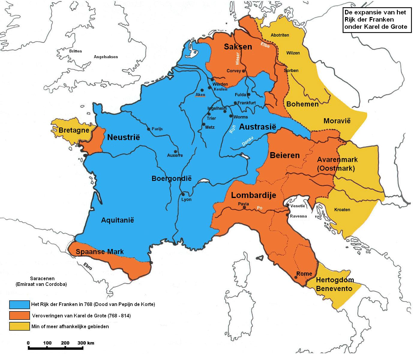 de wiki: vertaald naar het Nederlands